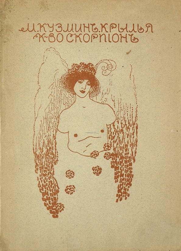 Обложка книги "Крылья" Михаила Кузмина 1908 года издания. Рисунок Н. Феофилактова.